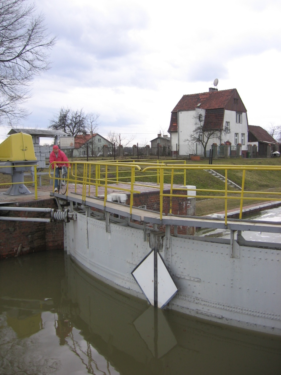 Wrocław, Poland Opatowicka sluice (from east)